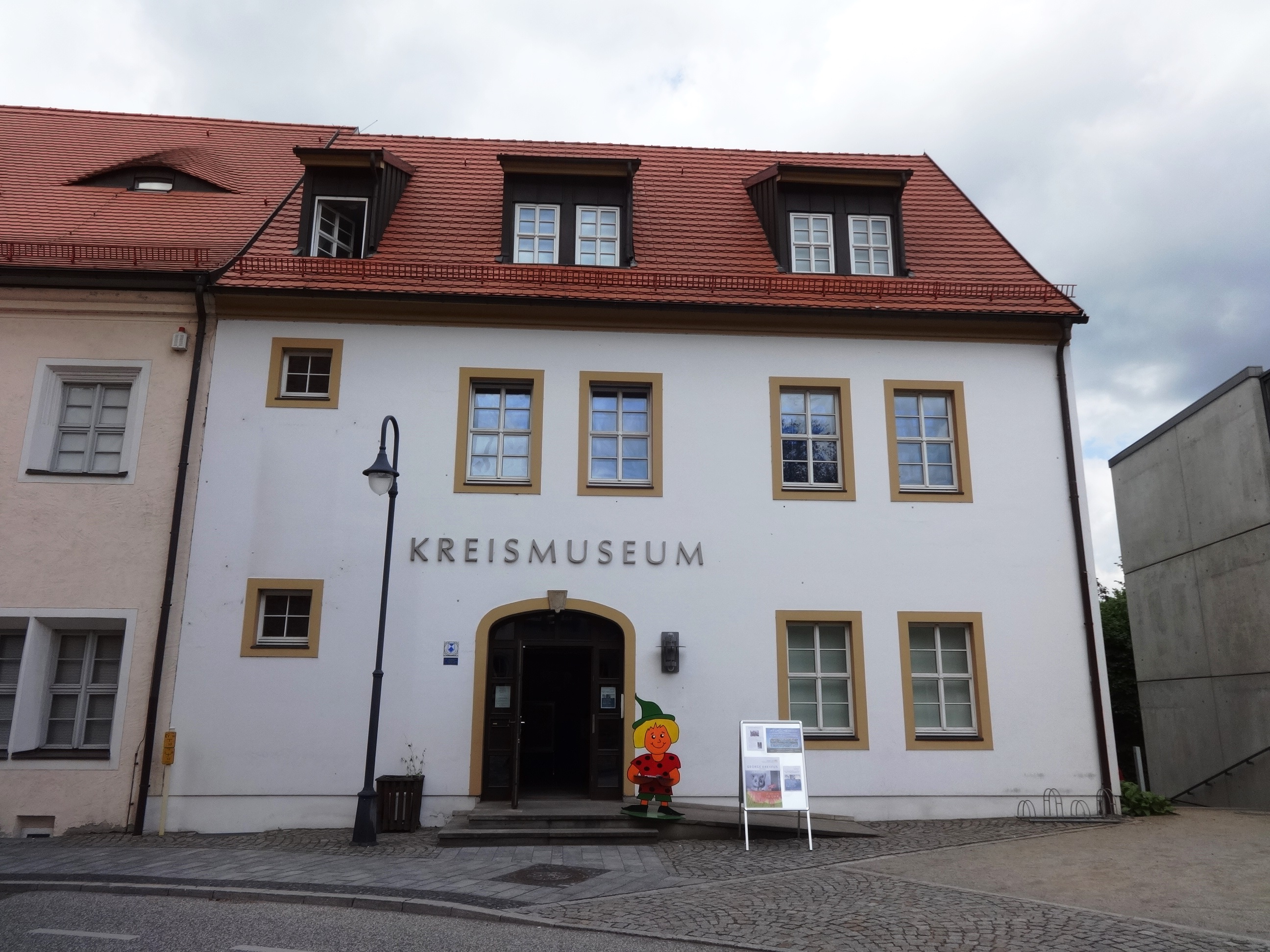 Das Kreismuseum Bad Liebenwerda zeigt die Heimatgeschichte der Stadt und der Region sowie in einer Sonderausstellung die Bedeutung des Marionettentheates.